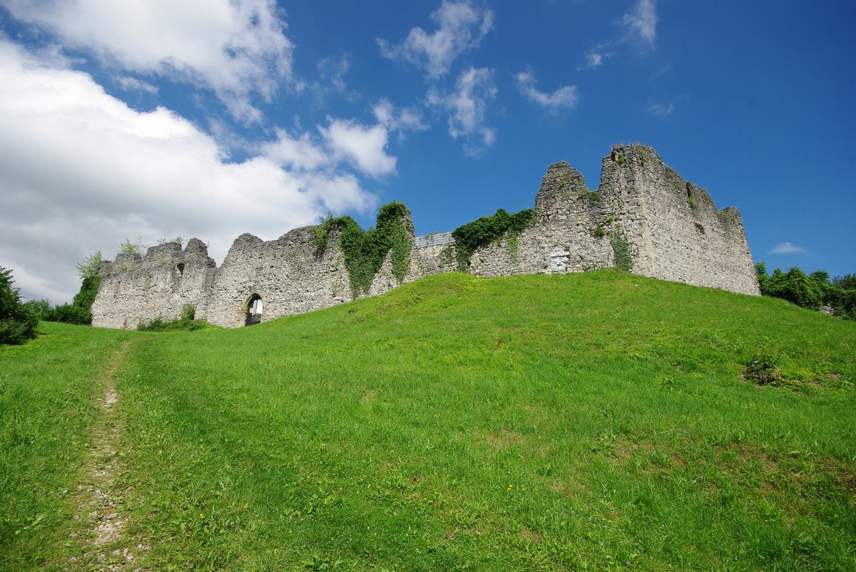 Plainburg